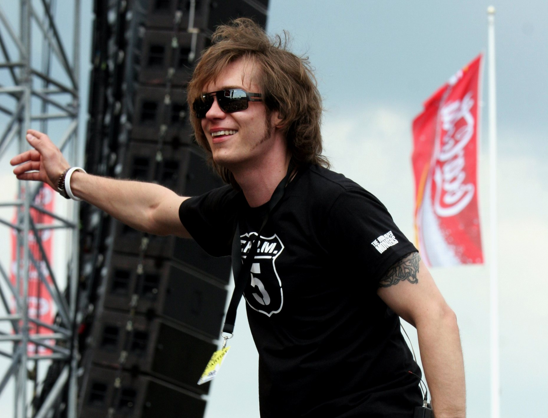 Thomas Godoj bei einem Auftritt in Oschersleben am 7. Juni 2008